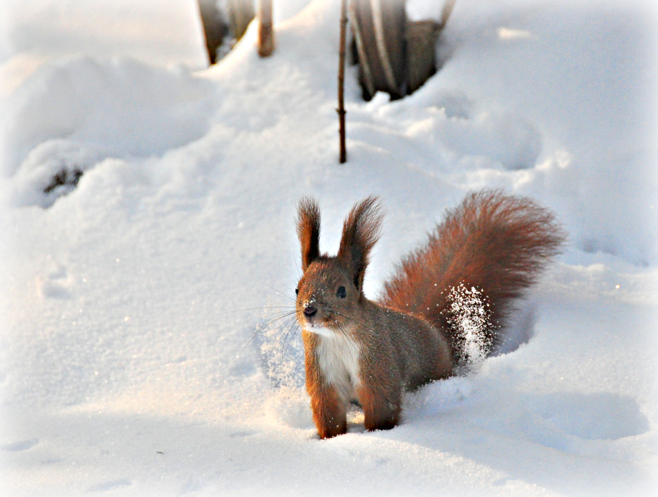 Вивірка звичайна (Sciurus vulgaris) У Стрийському парку, Львів